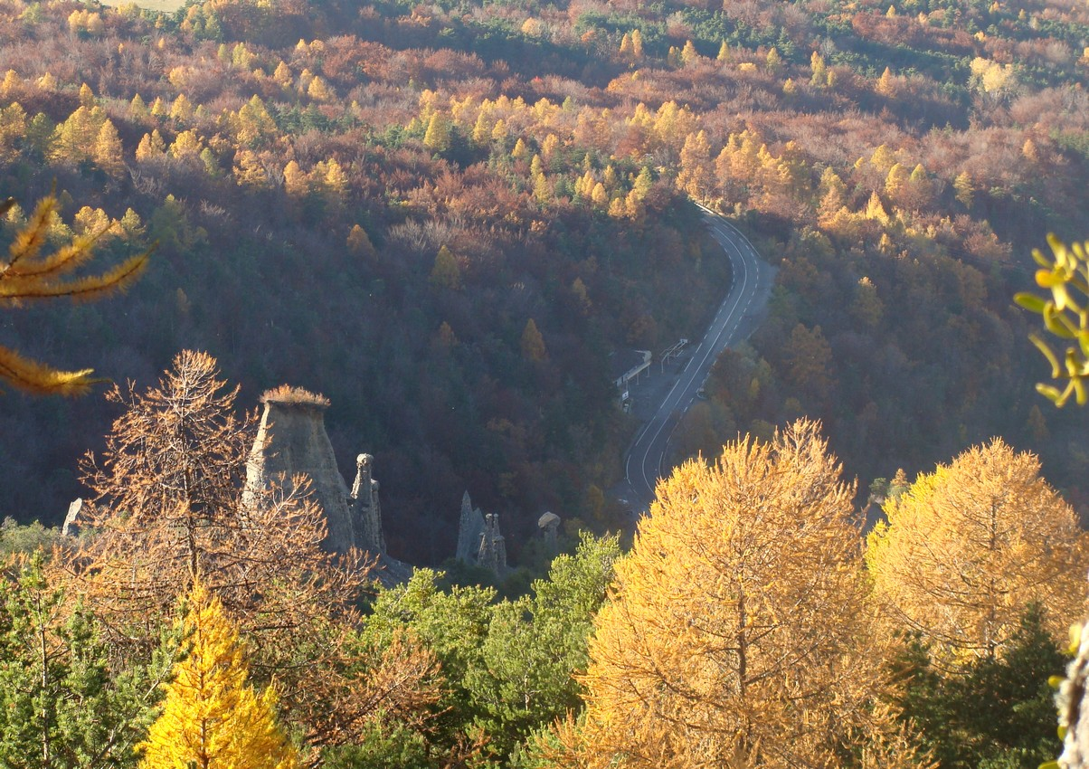 Les demoiselles coiffées de Pontis vues de la route du col (D 7). On aperçoit en bas la route de Savines à Sauze-du-Lac (D 854) d'où on voit mieux le site.